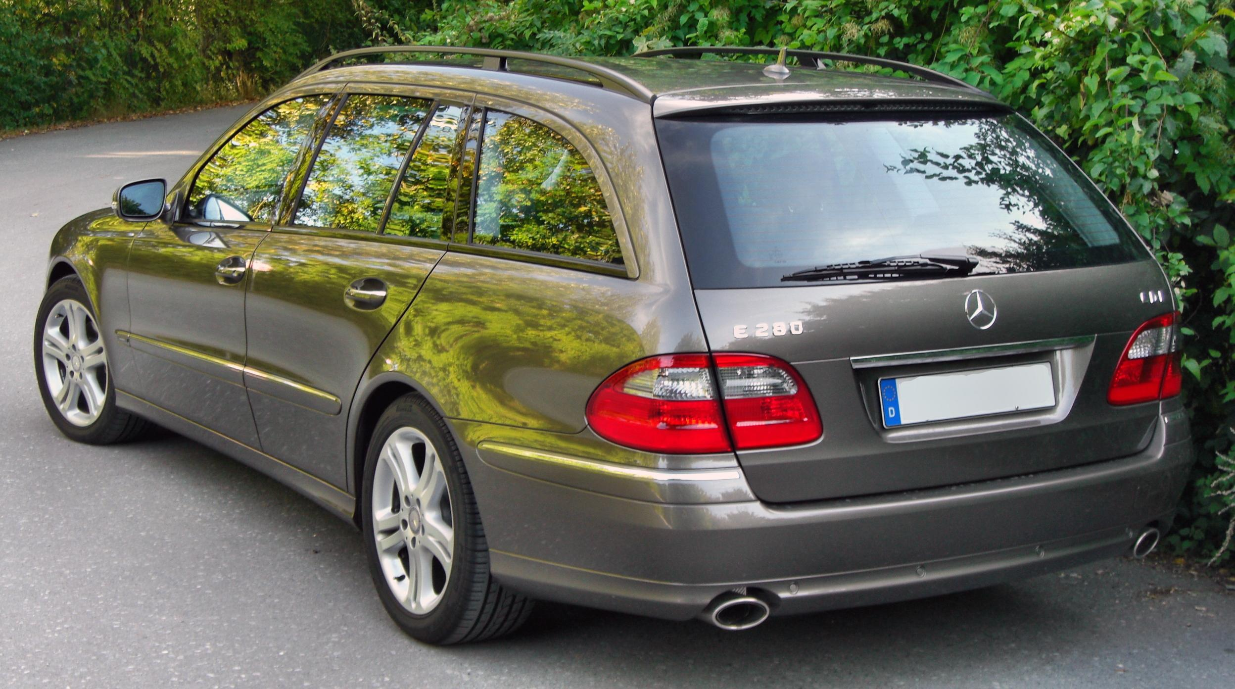 Mercedes E280CDI T-Modell